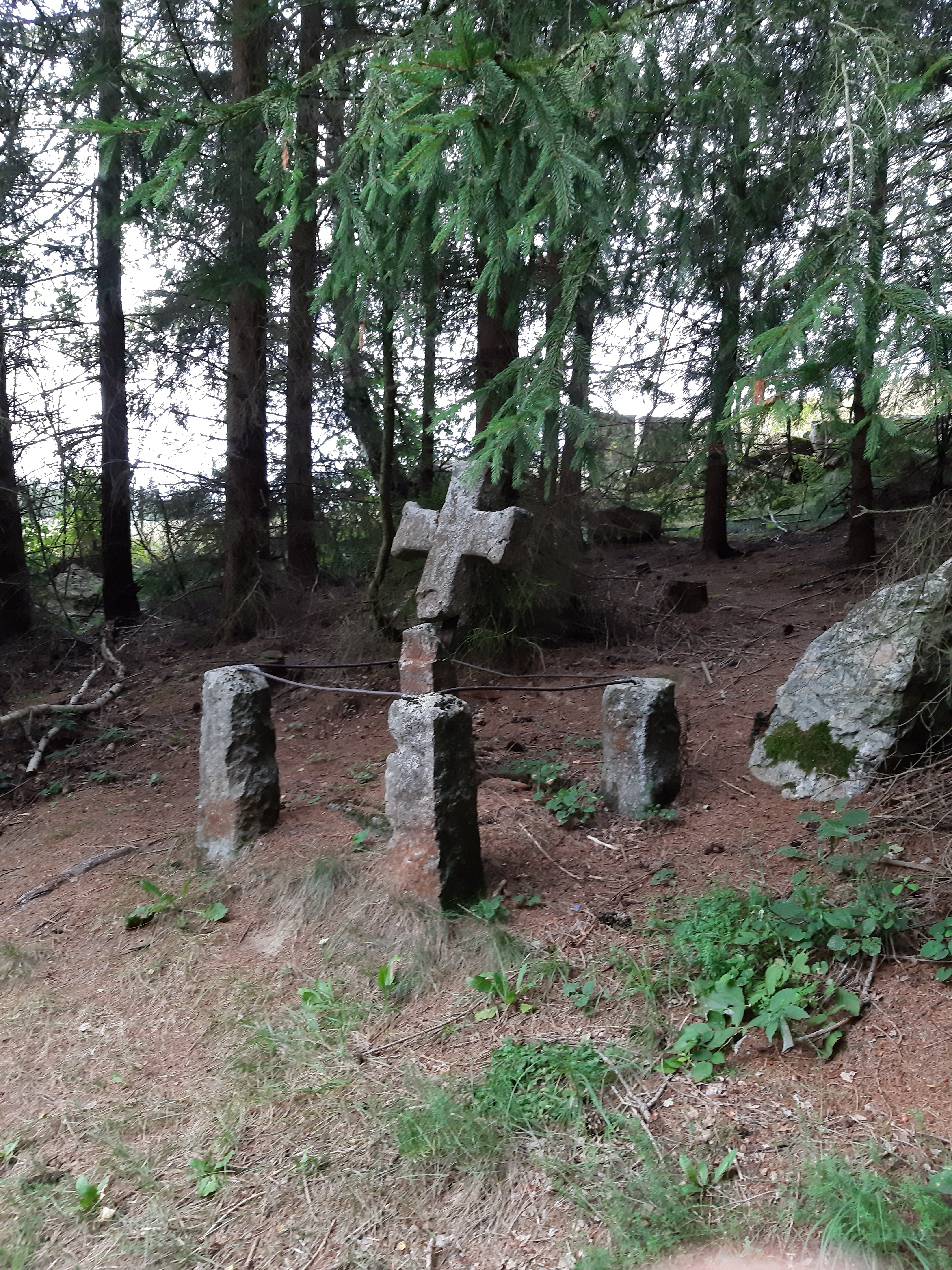 Čábuze, okres Prachatice, smírčí kříž